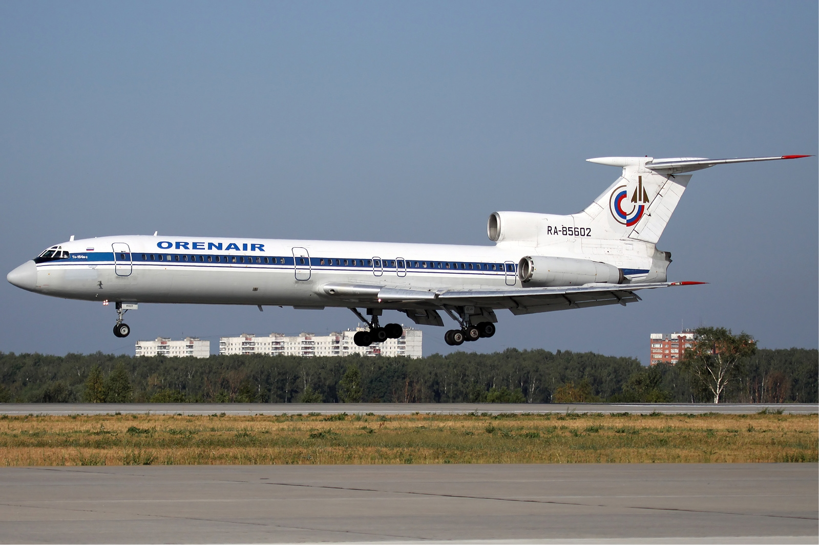 Orenair Tupolev Tu-154M